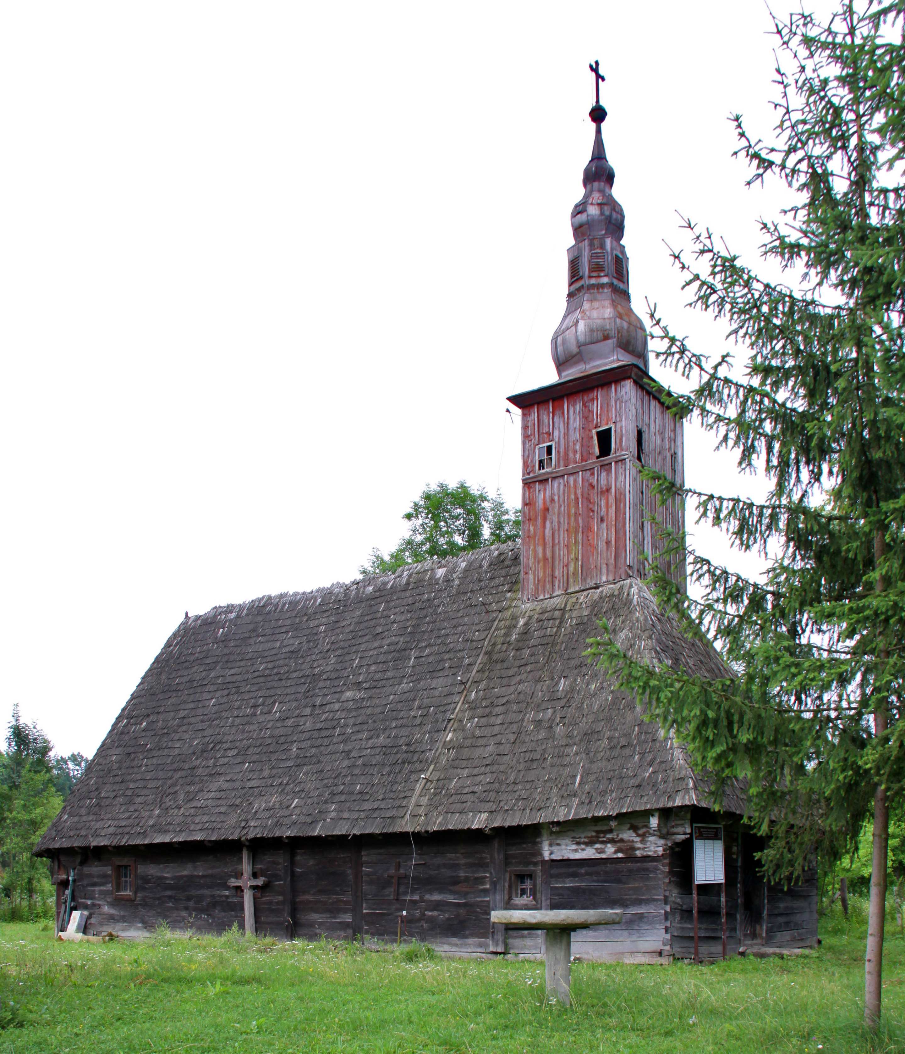 Sălciva, Hunedoara, biserica de lemn: fațada de nord.